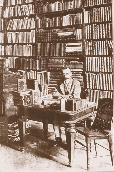 Василий Иванович Клочков (1861-1915) - книгоиздатель, книгопродавец, антиквар и библиофил.